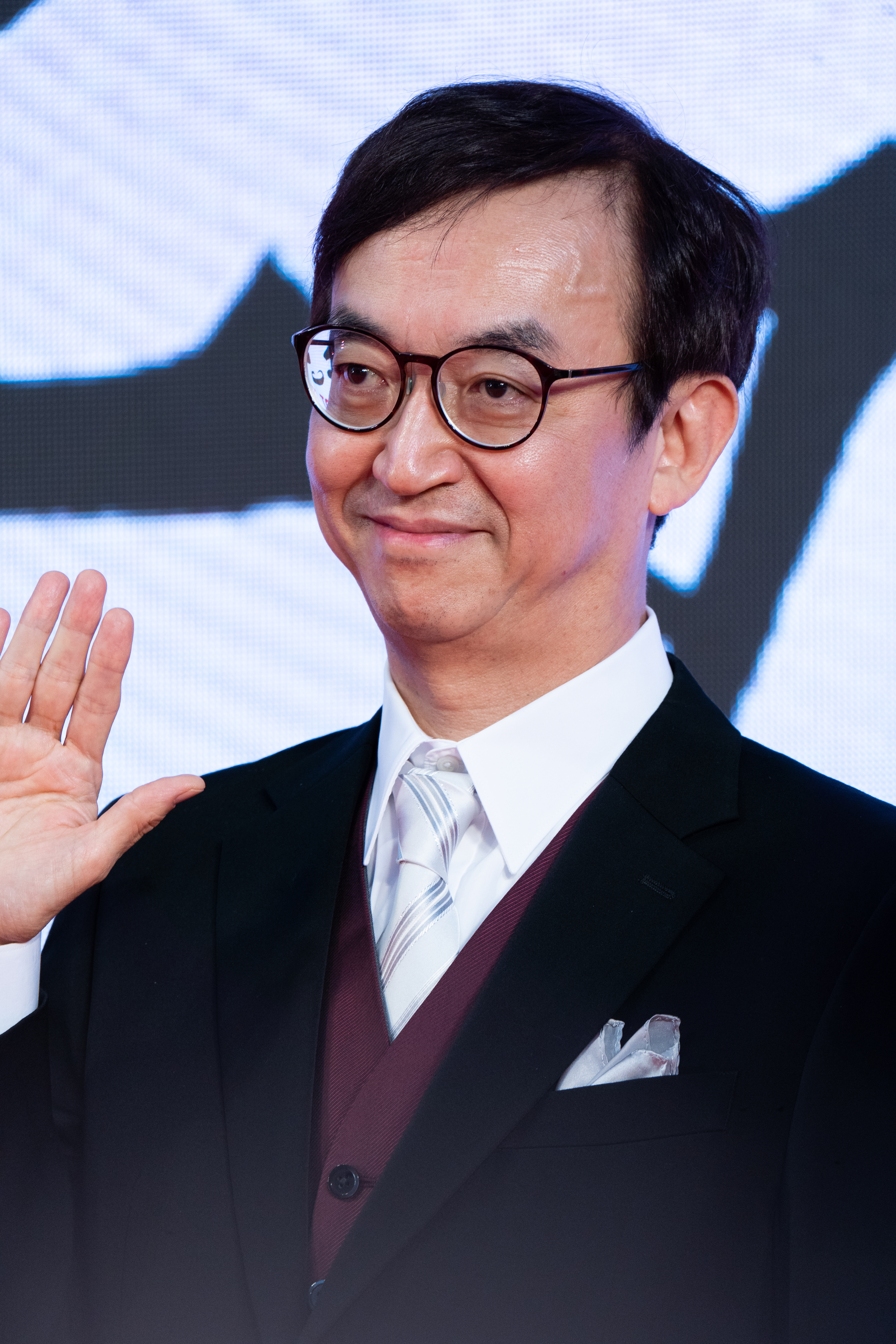 第32回 東京国際映画祭 オープニングセレモニー 氷川竜介 (ジャパニーズ・アニメーション「THE EVOLUTION OF JAPANESE ANIMATION/VFX」)